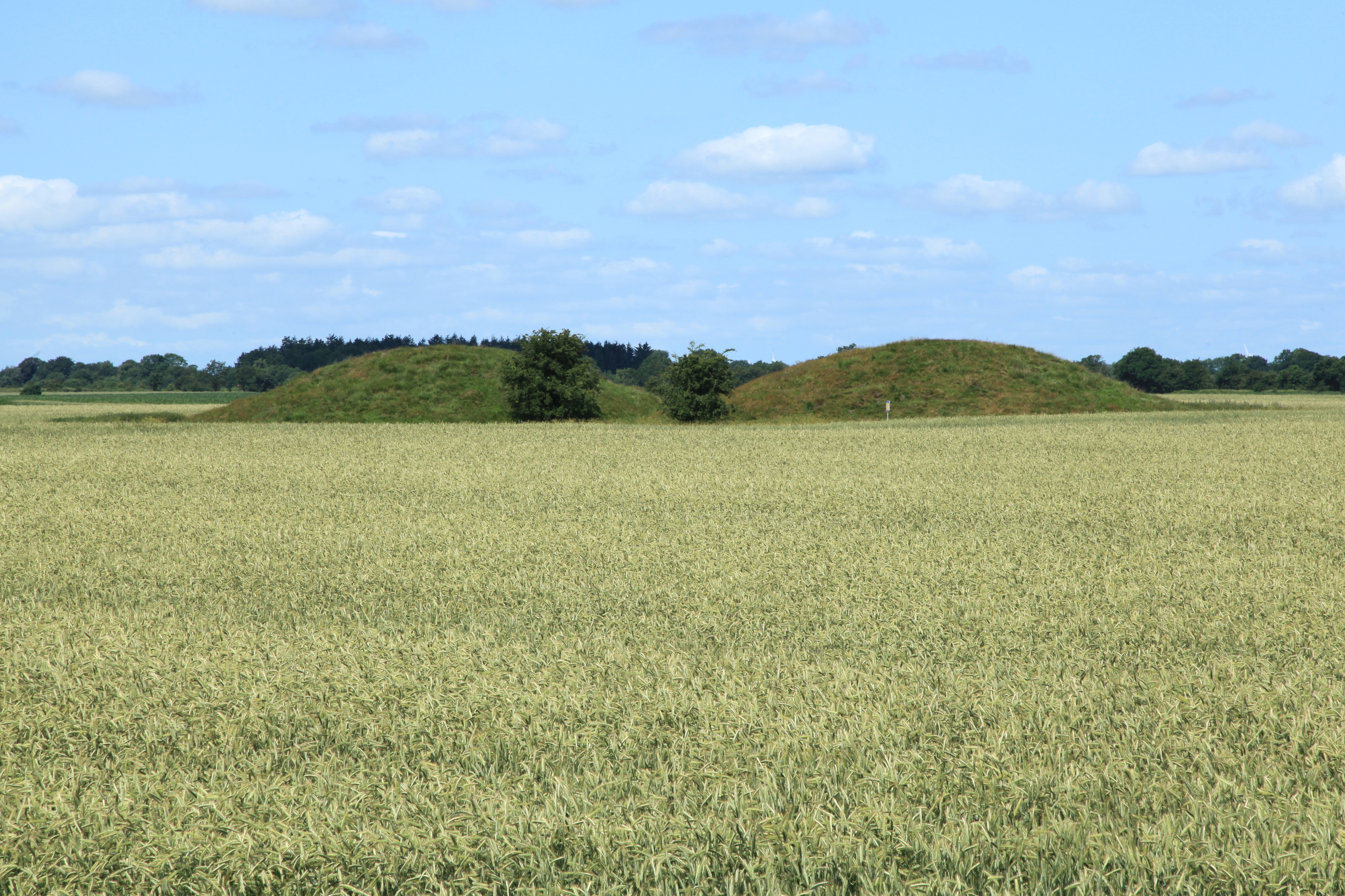 Grabhügel Tweebargen, nahe Kograben und Ochsenweg in Dannewerk